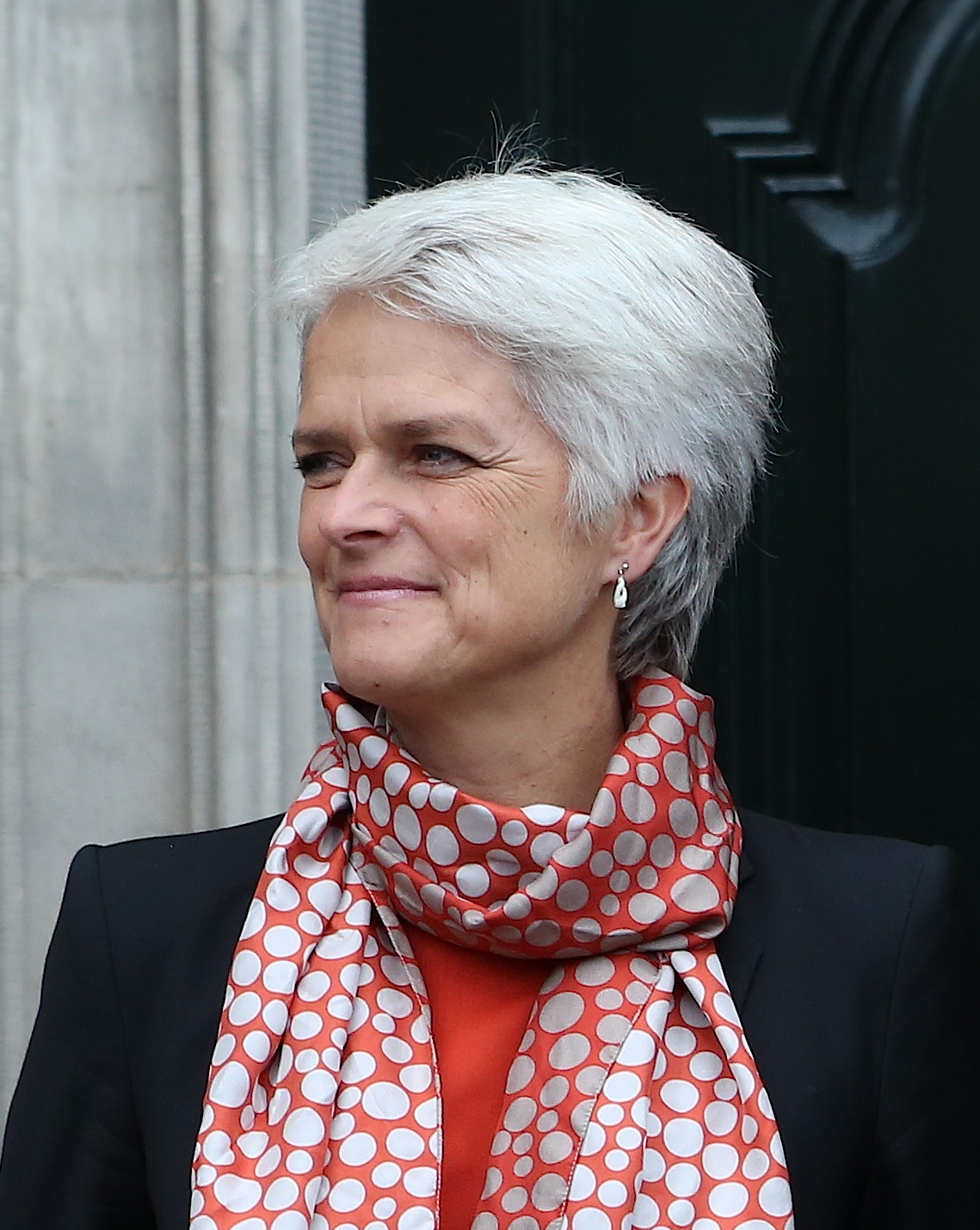 Statsminister Helle Thorning-Schmidt præsentere de 2 nye ministre fra partiet SF, Annette Vilhelmsen og Holger K. Nielsen